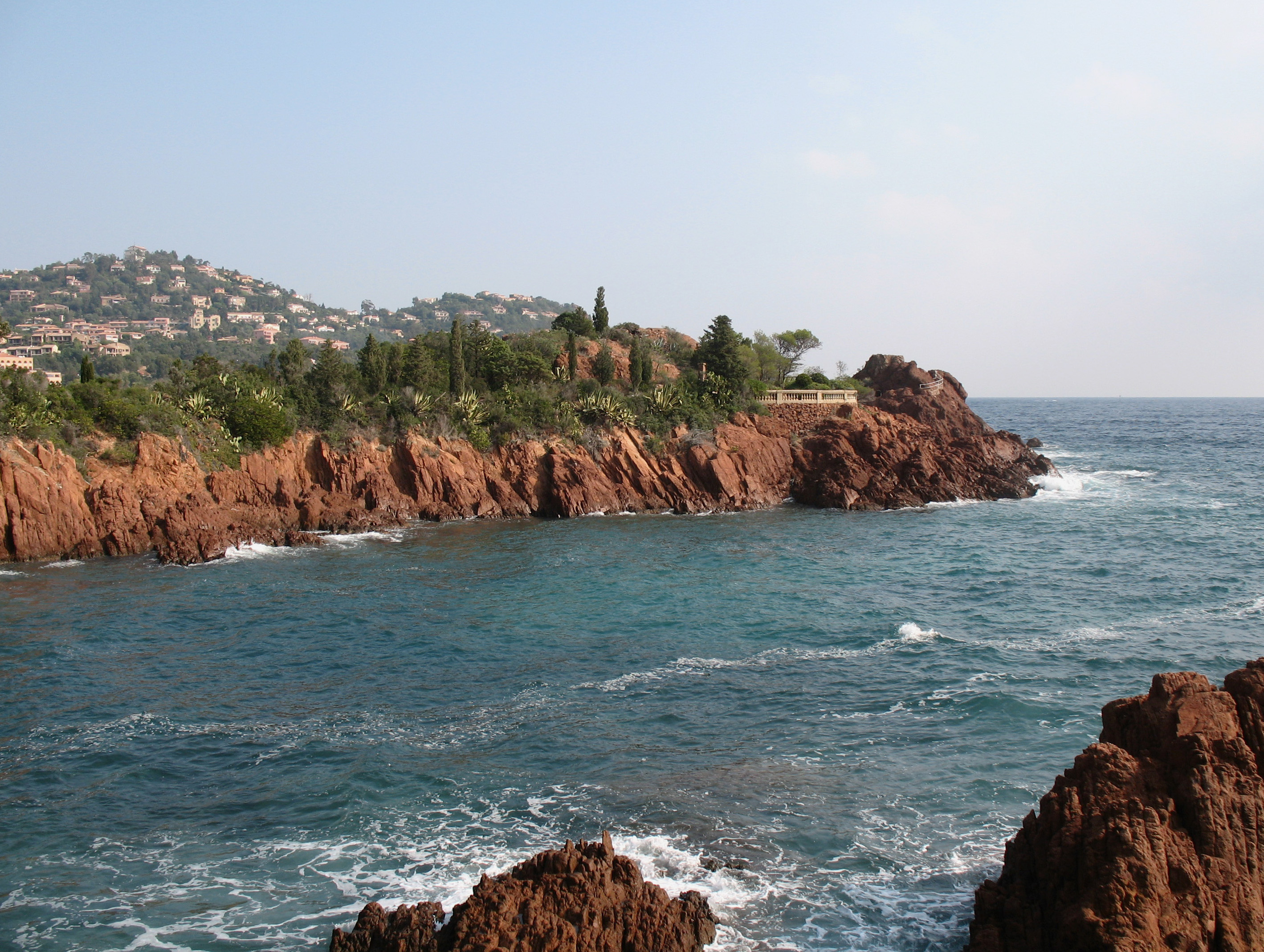 Calanque dans le Massif de l'Esterel, France